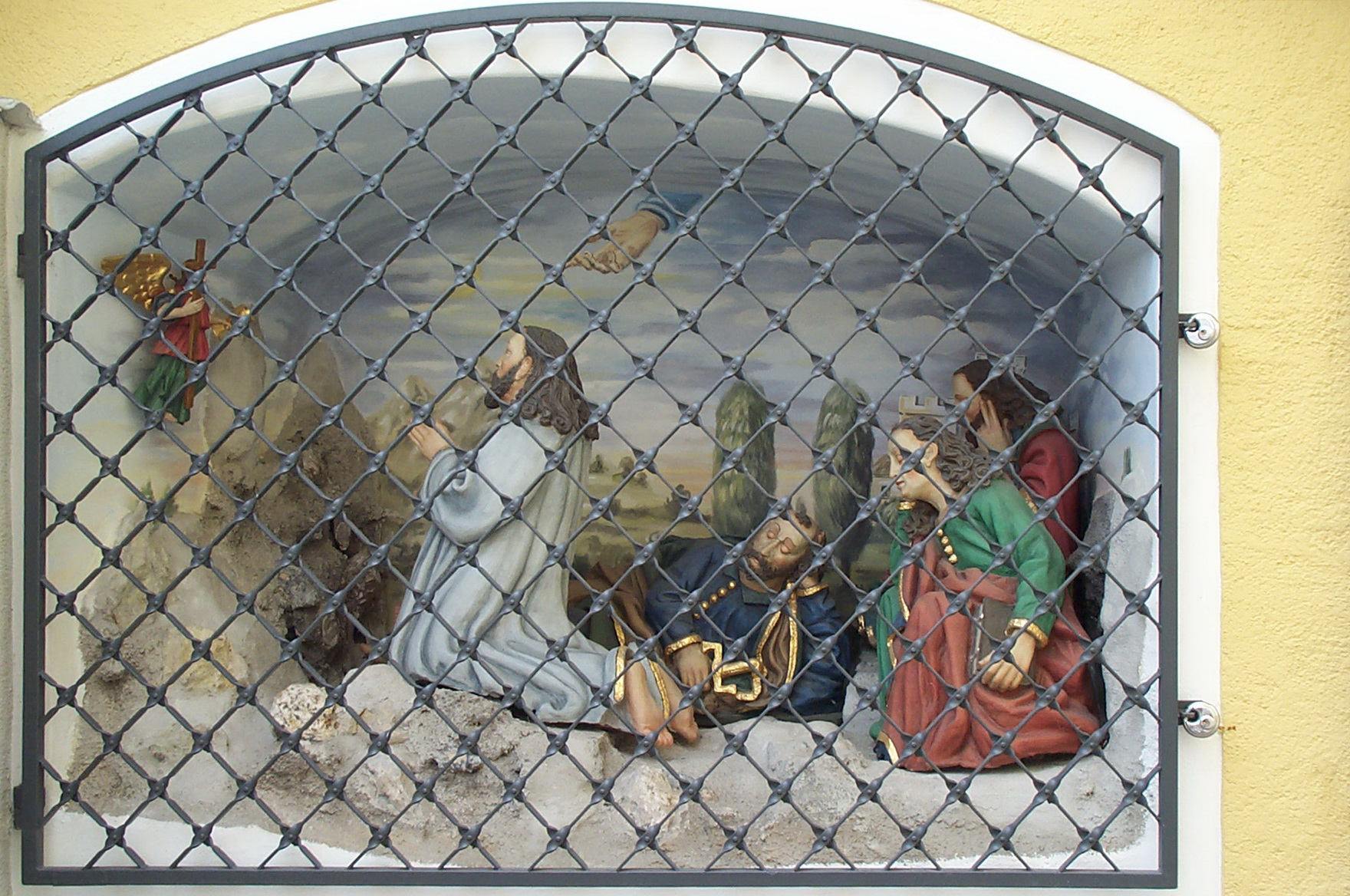 Langquaid Marktplatz 14. Katholische Pfarrkirche St. Jakob d. Ä. Saalkirche mit Steildach, eingezogenem Rechteckchor und Chorscheitelturm, Portalvorhalle nach Süden, Chor und Turm im Kern romanisch, 13. Jahrhundert, Langhaus spätgotisch, 15. Jahrhundert, Barockisierung der Anlage um 1740, Verlängerung nach Westen, 1917; mit Ausstattung; Seelenkapelle, rechteckiger Satteldachbau, 18. Jahrhundert. Friedhofsmauer mit Grabdenkmälern des 17. bis 19. Jahrhunderts. Ölbergszene in kleiner Flachsatteldachkapelle mit segmentbogiger Bildöffnung, 1643.